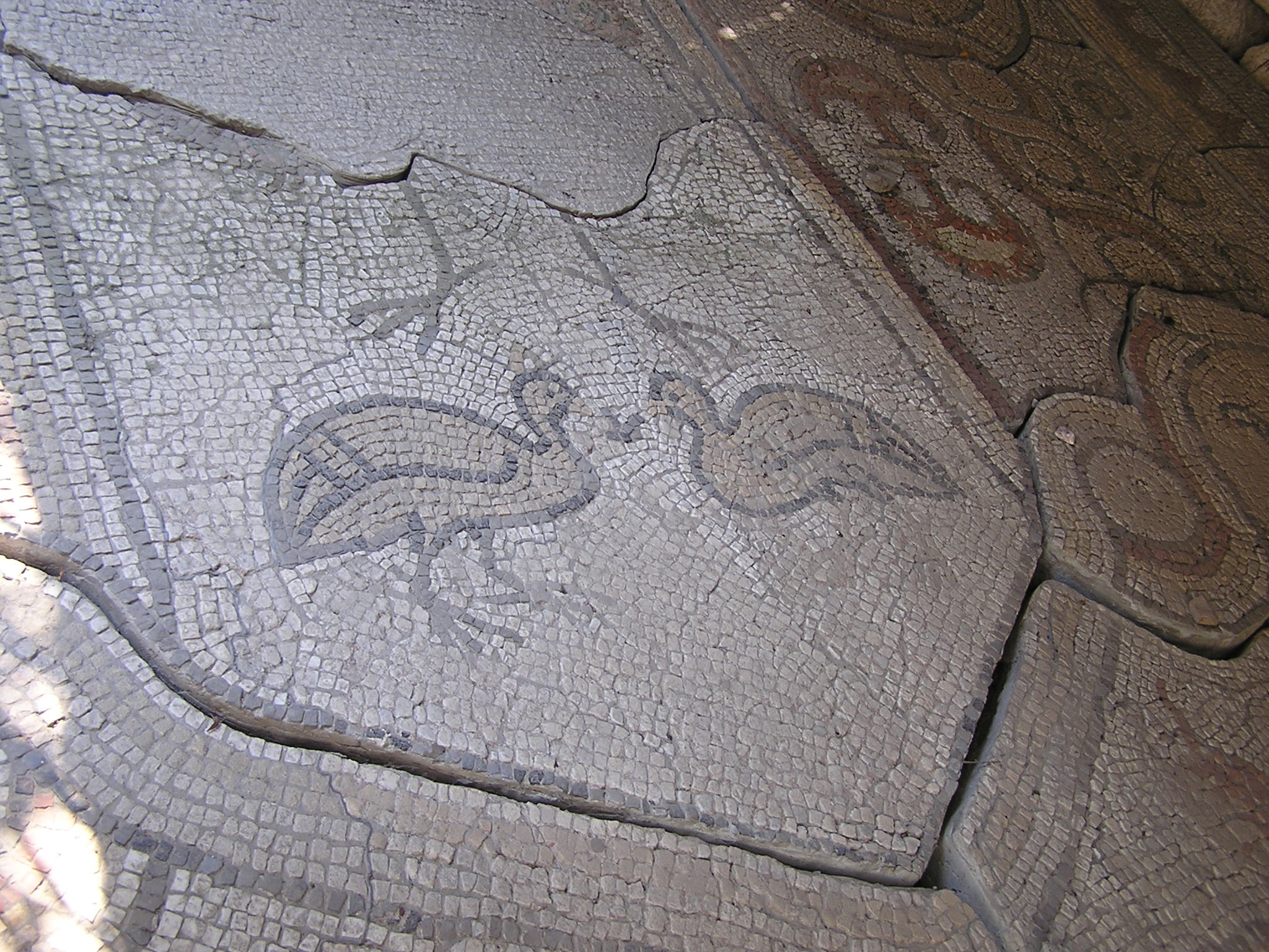 Херсонес. Мозаика